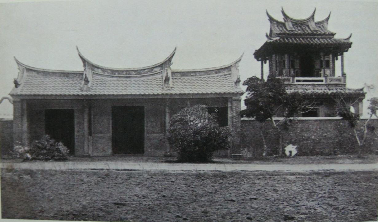 日本時代的澎湖文石書院